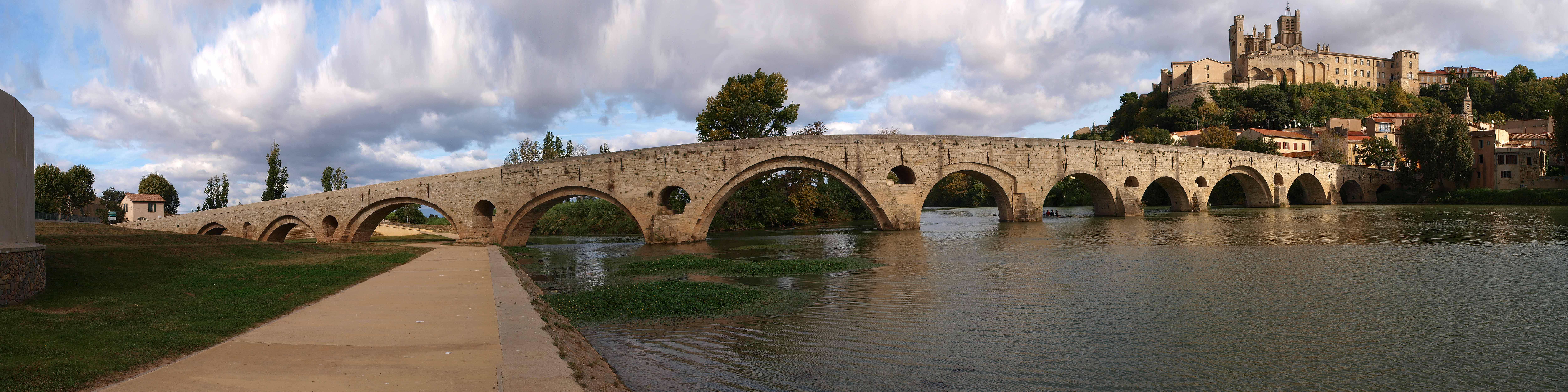 Vue du Pont Vieux sur l'Orb et de la cathédrale Saint-Nazaire de Béziers (Hérault)